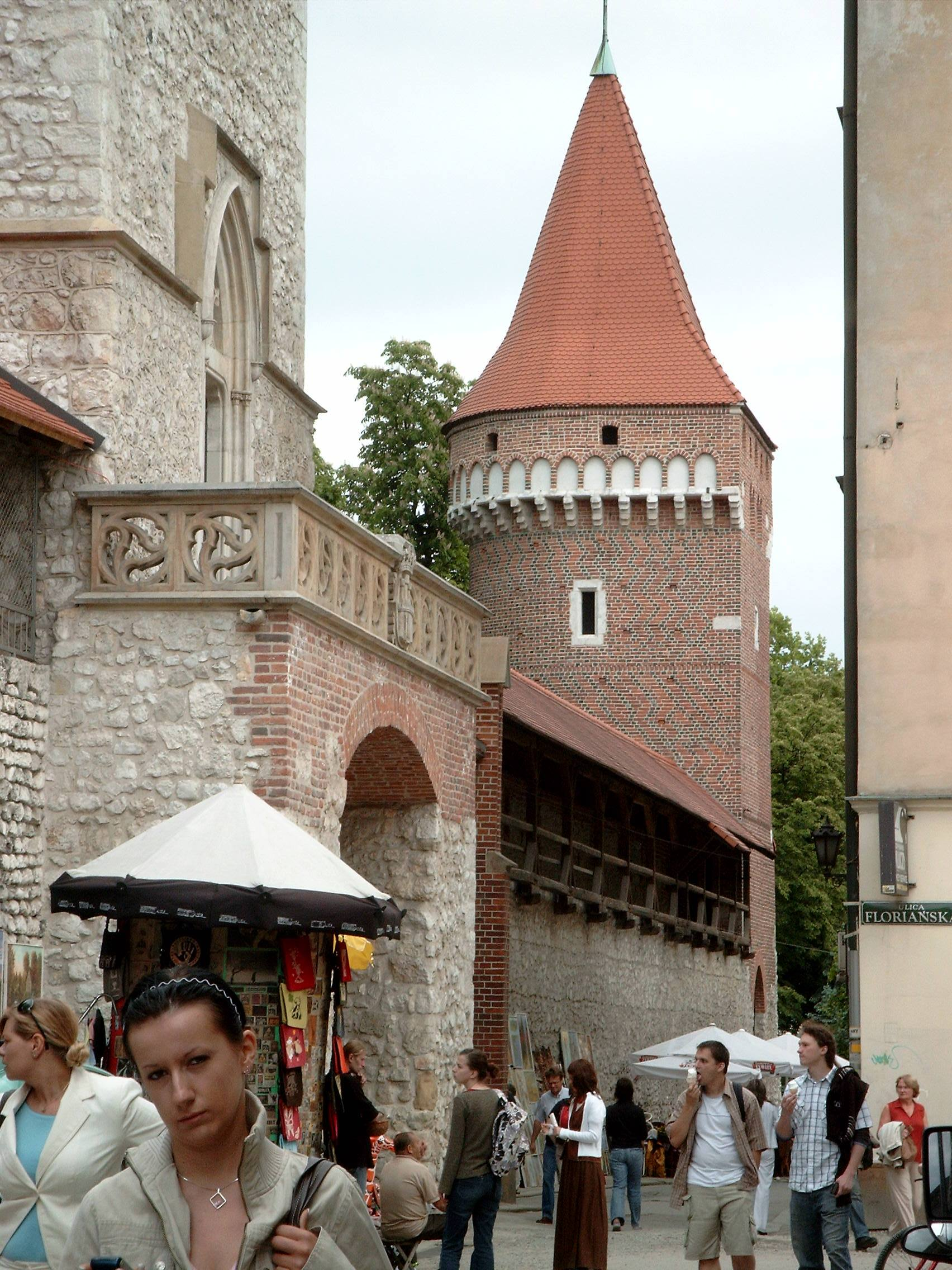 Baszta pasamoników w Krakowie